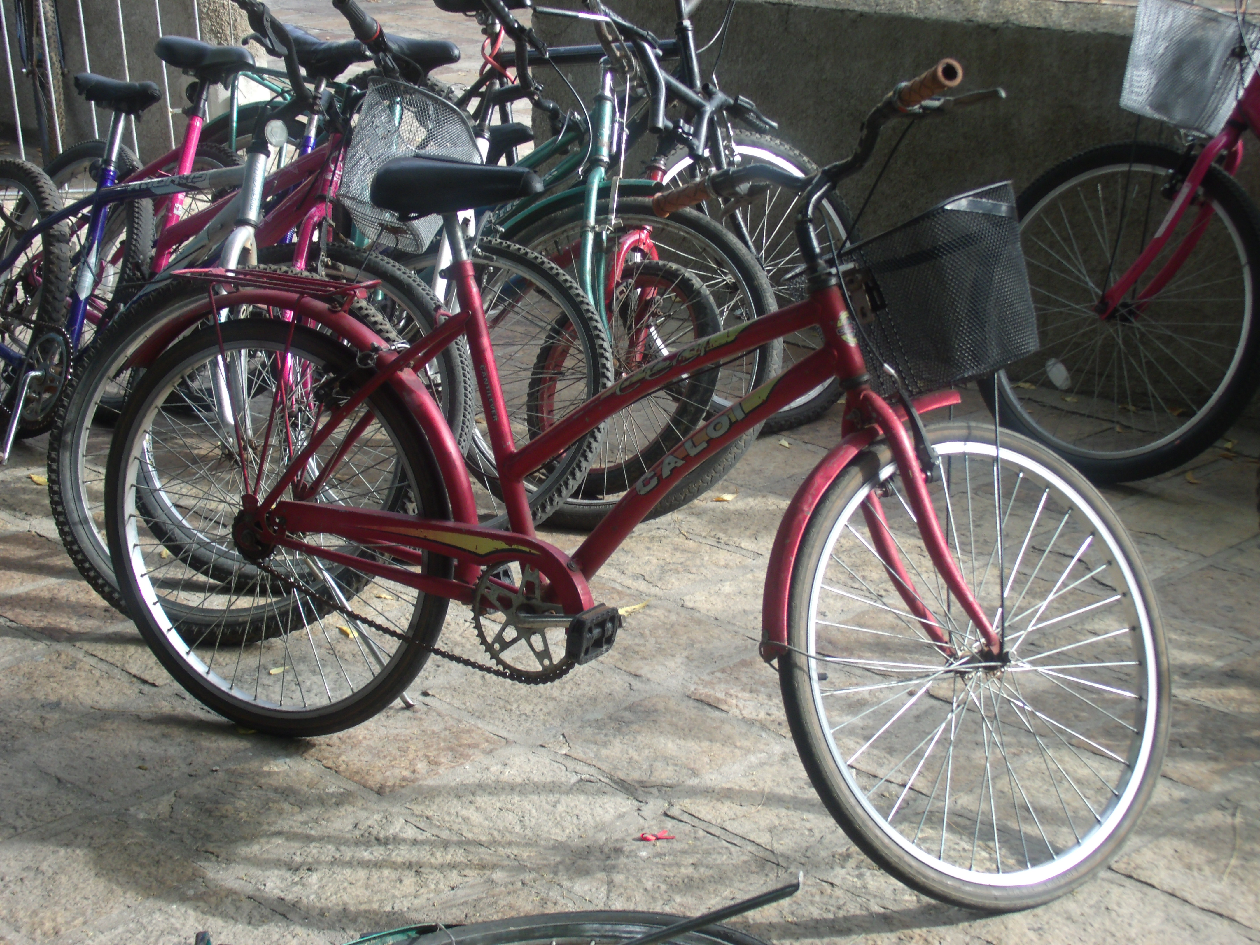 Uma Caloi Ceci mais atual num bicicletário escolar.